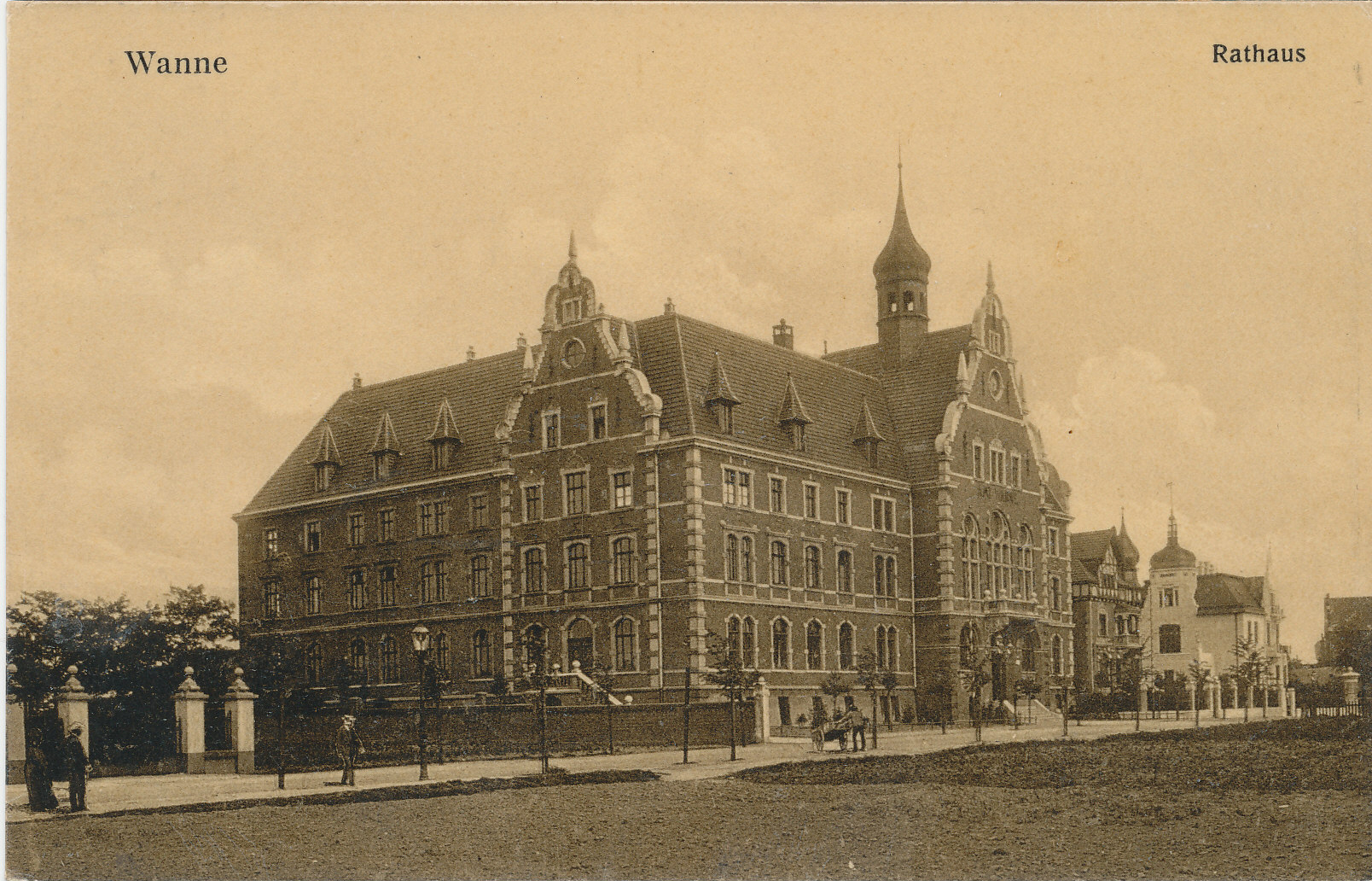 Wanne, Rathaus gestempelt 13. März 1910.